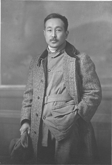 有島武郎(Arishima Takeo,1878-1923)